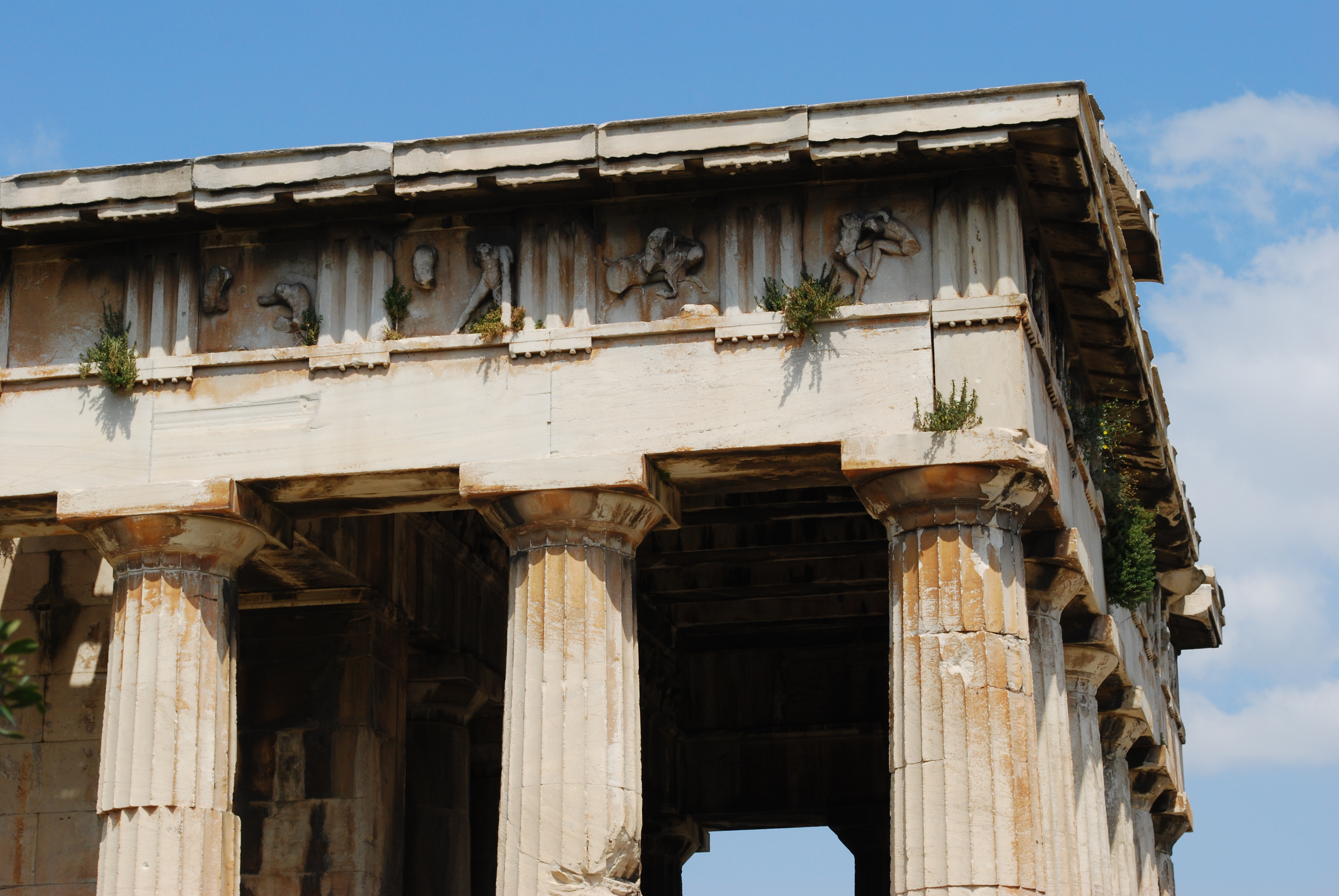 Le temple d'Héphaïstos sur l'agora d'Athènes.